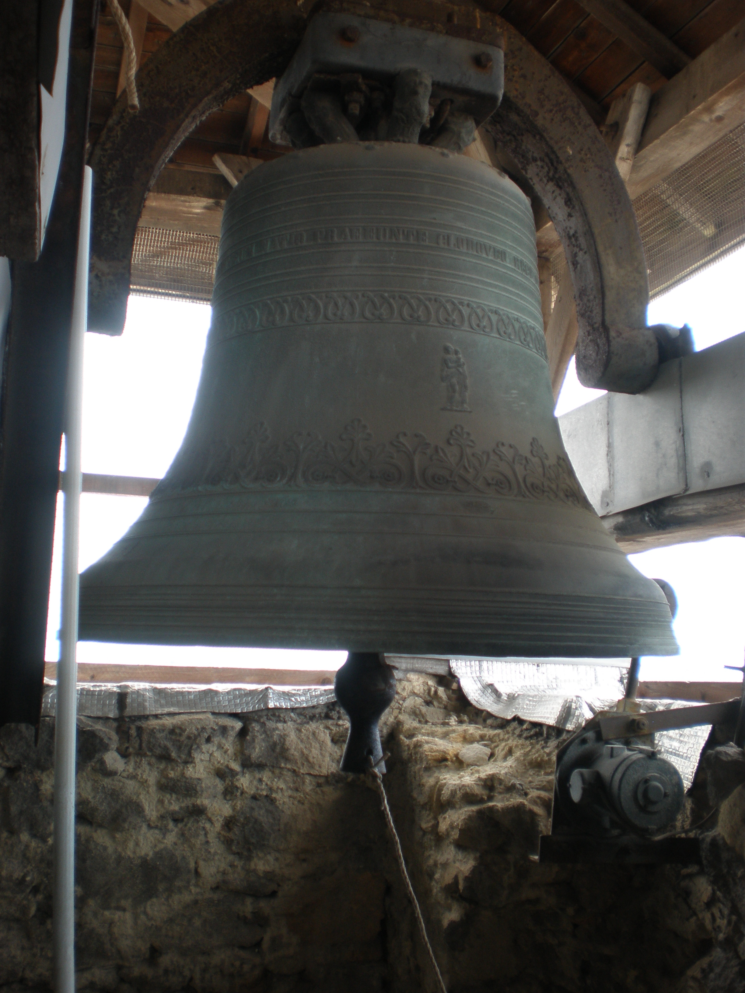 Eine der Glocken der St. Rochus-Kirche in der südfranzösischen Stadt Montpellier